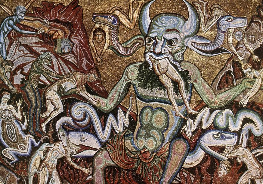 (detail)